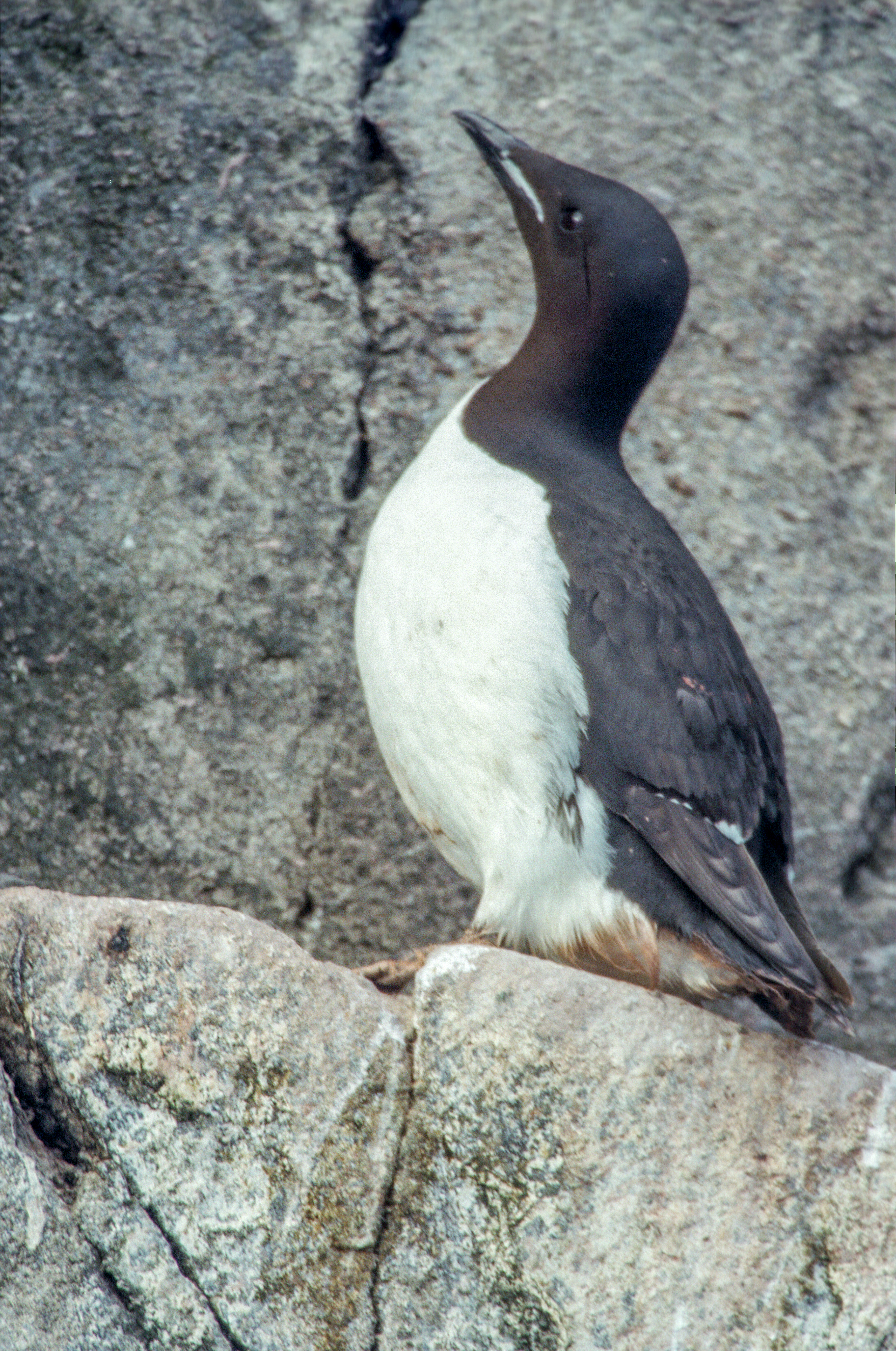 Spitsbergen/Uria lomvia/Alkefjellet/Brunnich's Guillemot